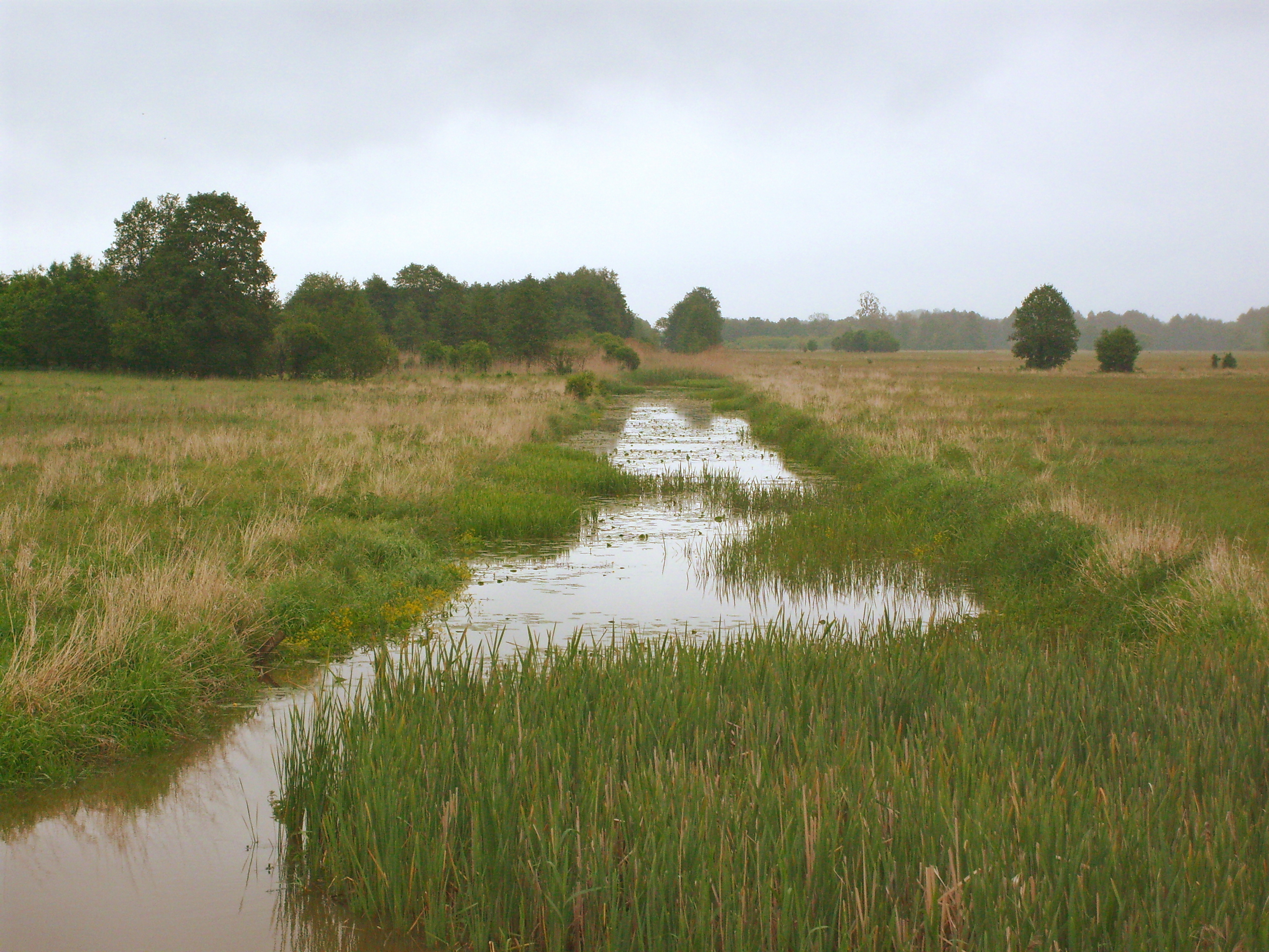 Kampinoski Park Narodowy - Kanał Łasica we Władysławowie.